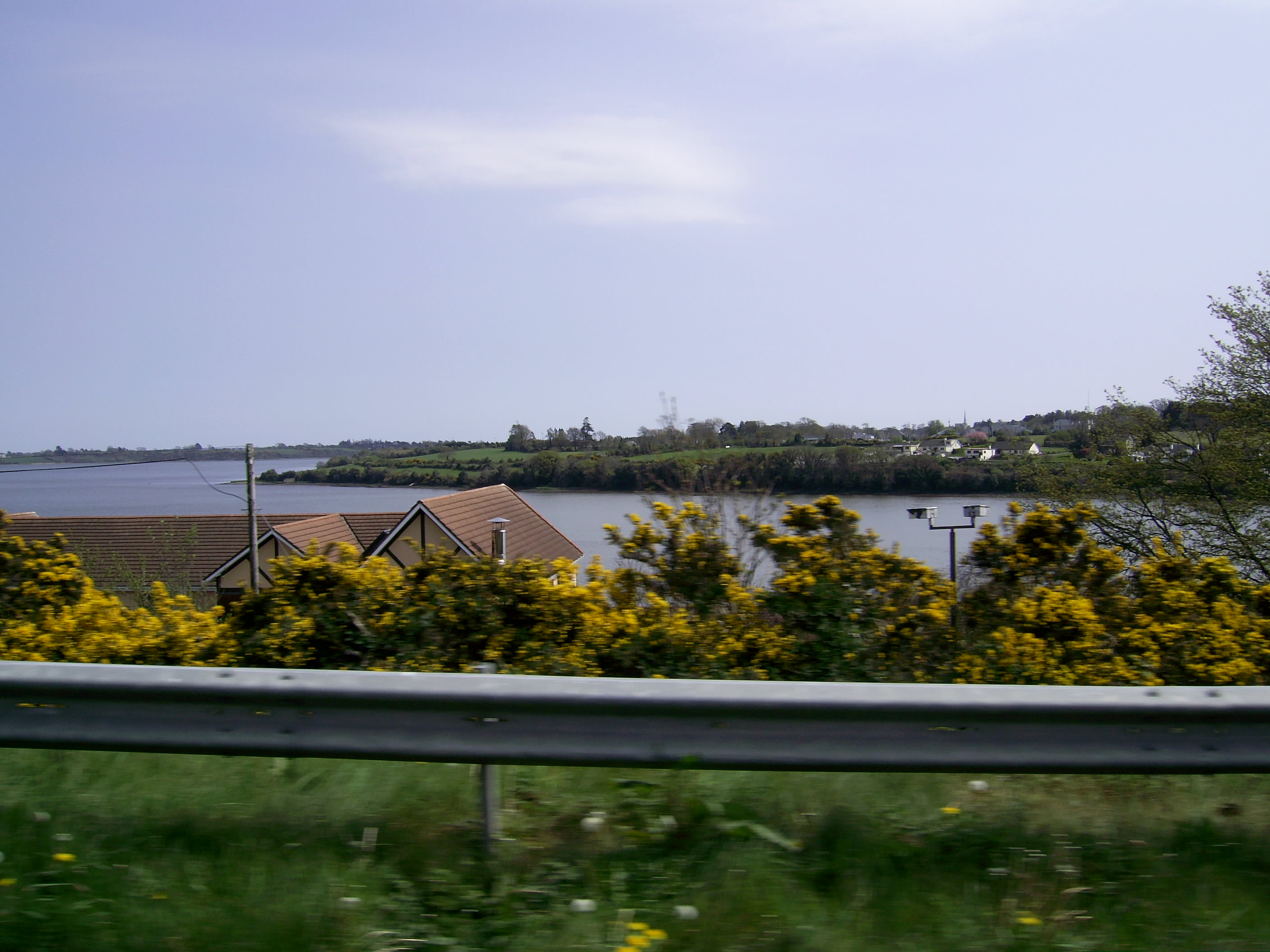 Estuaire_du_Slainey.jpg